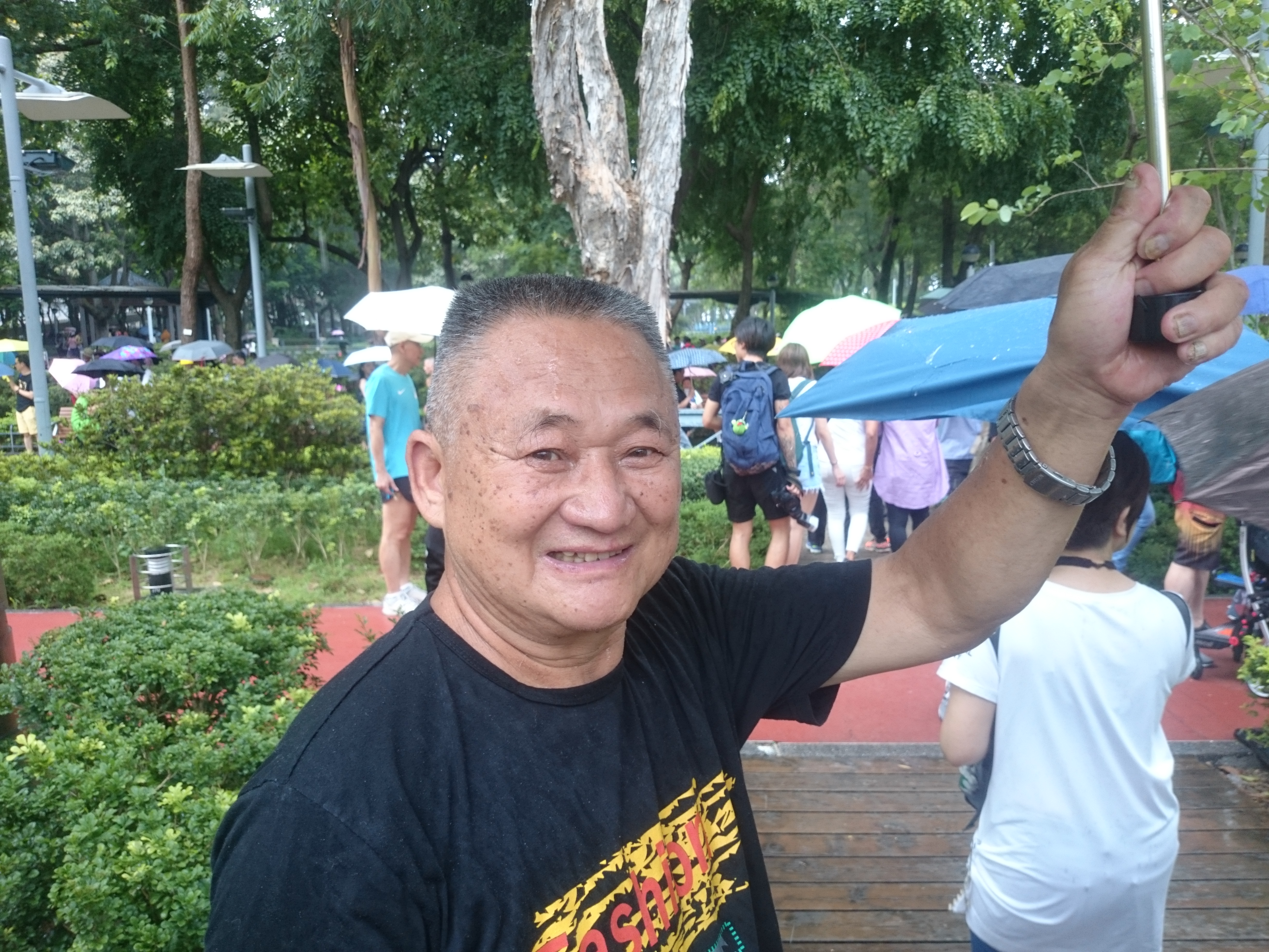 粵語: 朱韶洪企咗喺維多利亞公園度。